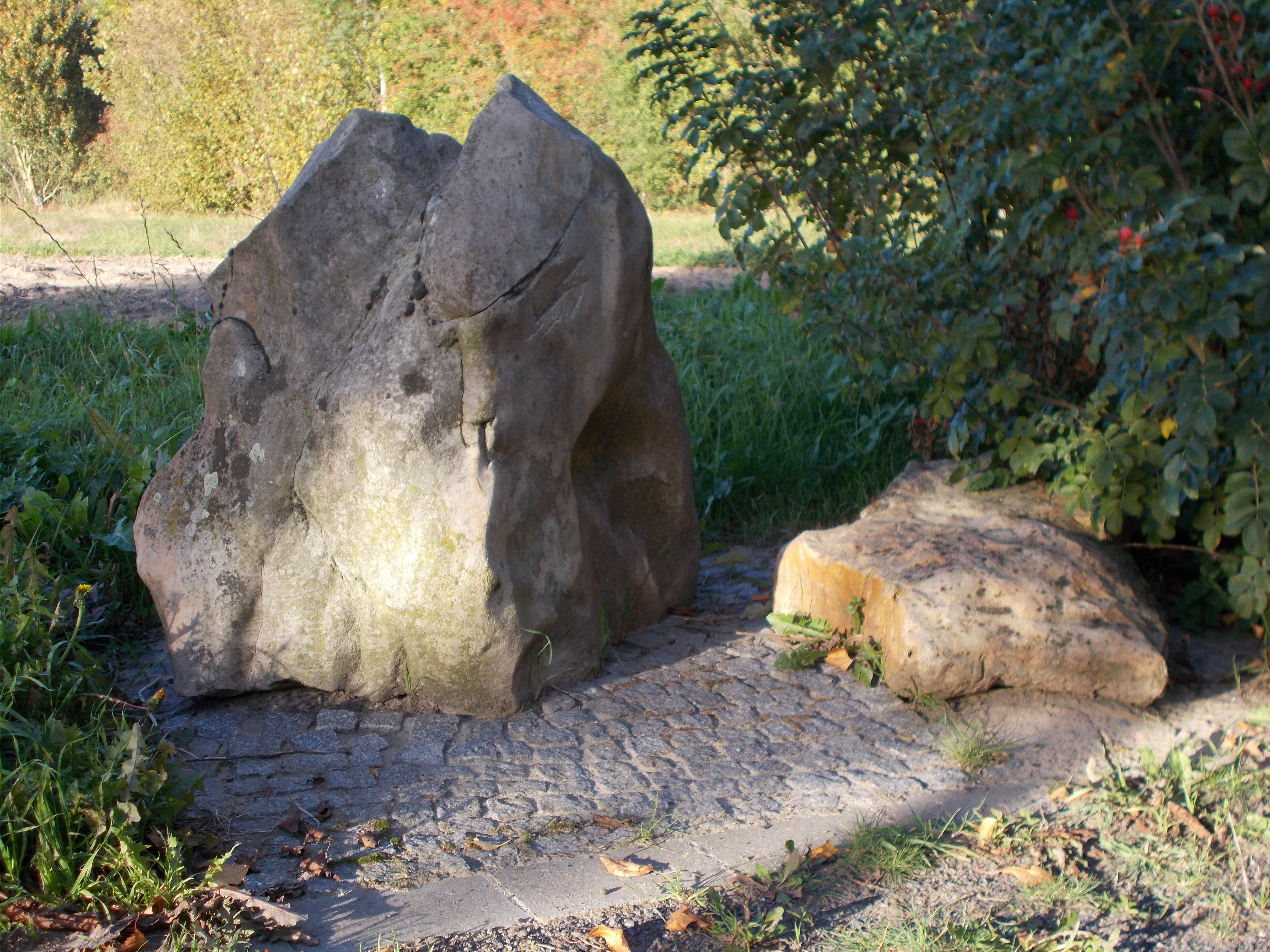 Findlingsweg Sonsbeck Station 1: Tertiär-Quarzit (Braunkohlenquarzit)